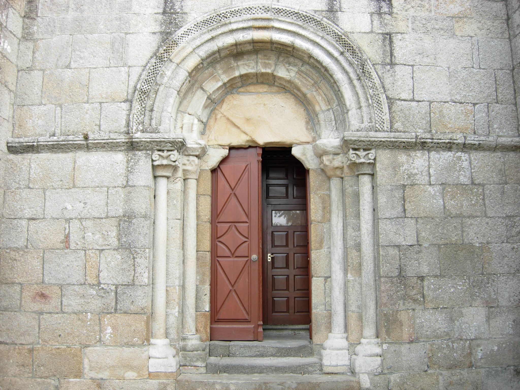 Igrexa de San Martiño de Sobrán - Vilagarcía de Arousa - Pontevedra